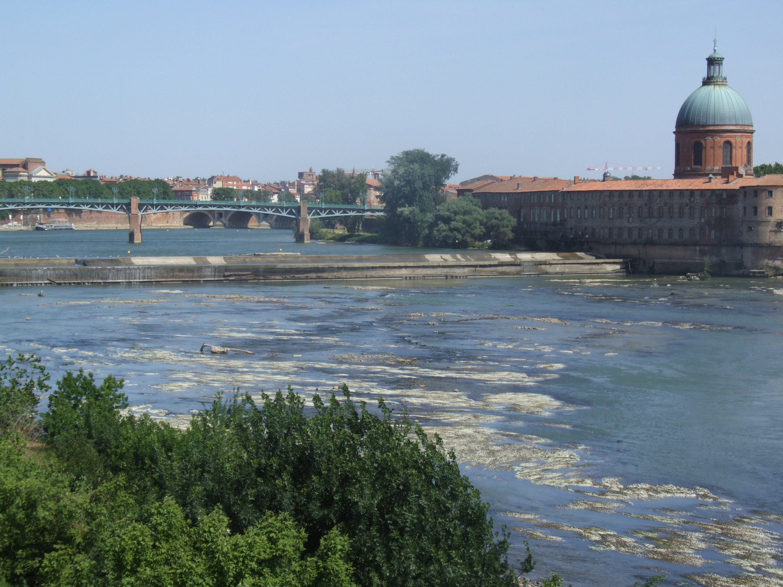 Le barrage du Bazacle sur la Garonne à Toulouse (Haute-Garonne, France).